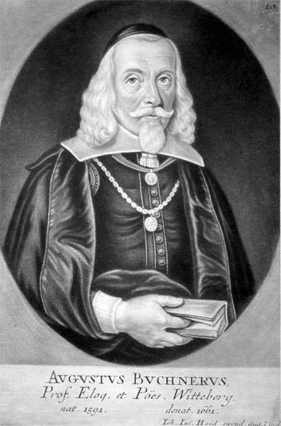 August Buchner; Schabkunstblatt